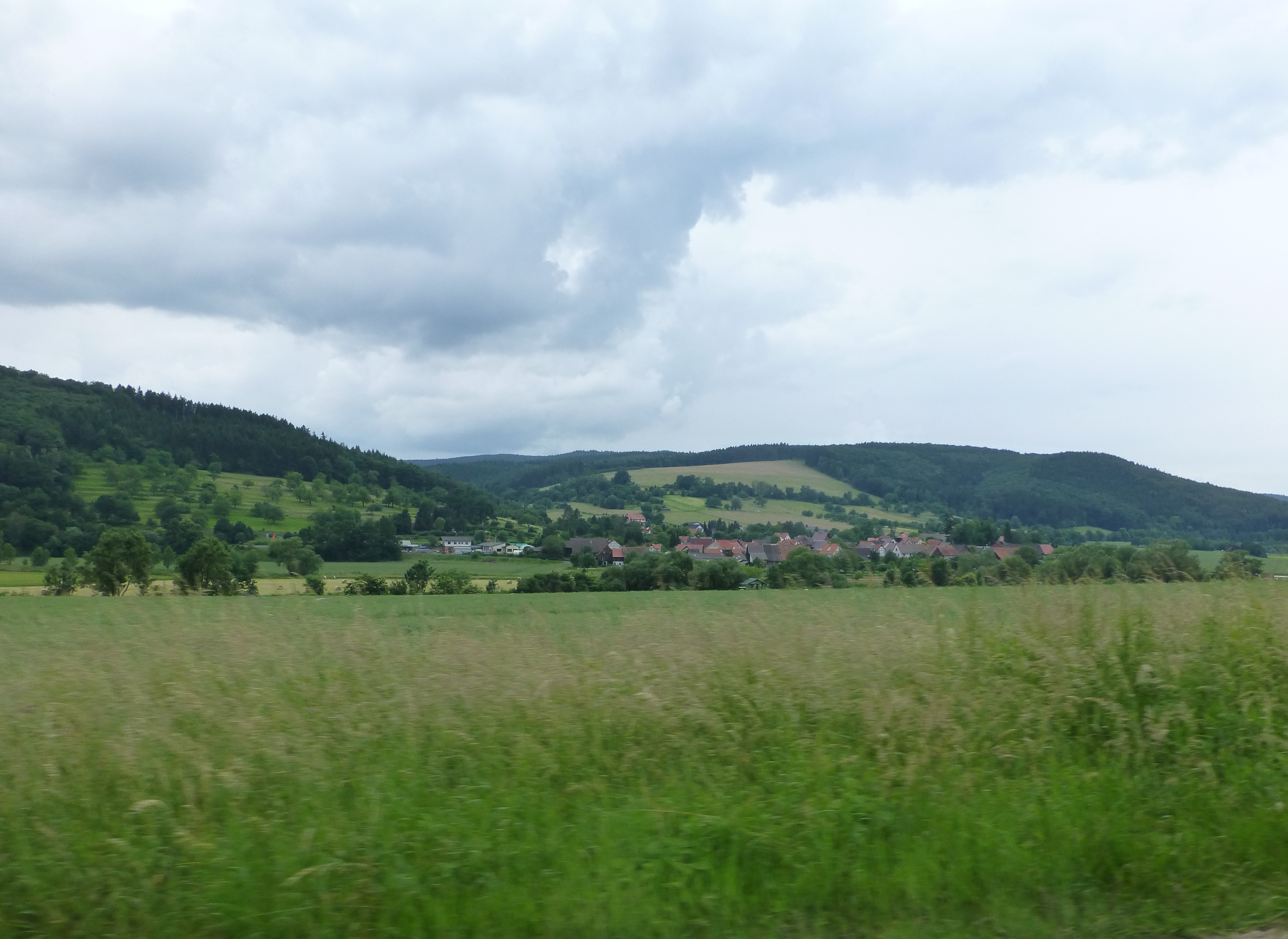 Ellershausen im Werratal (links der Hohe Ahrensberg, rechts der Solberg